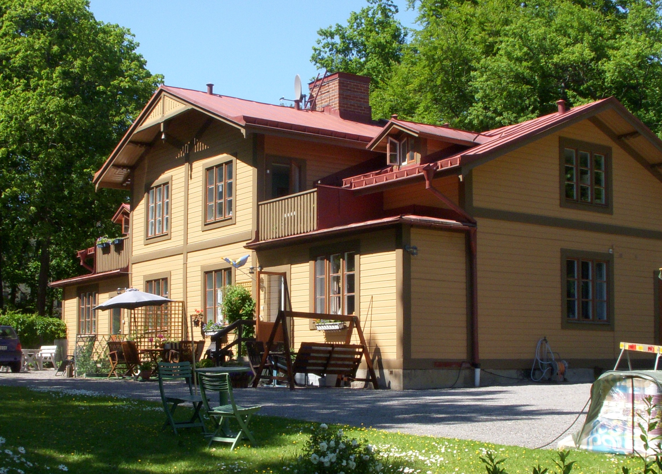 Nedre Manilla, Djurgården, träbyggnaden